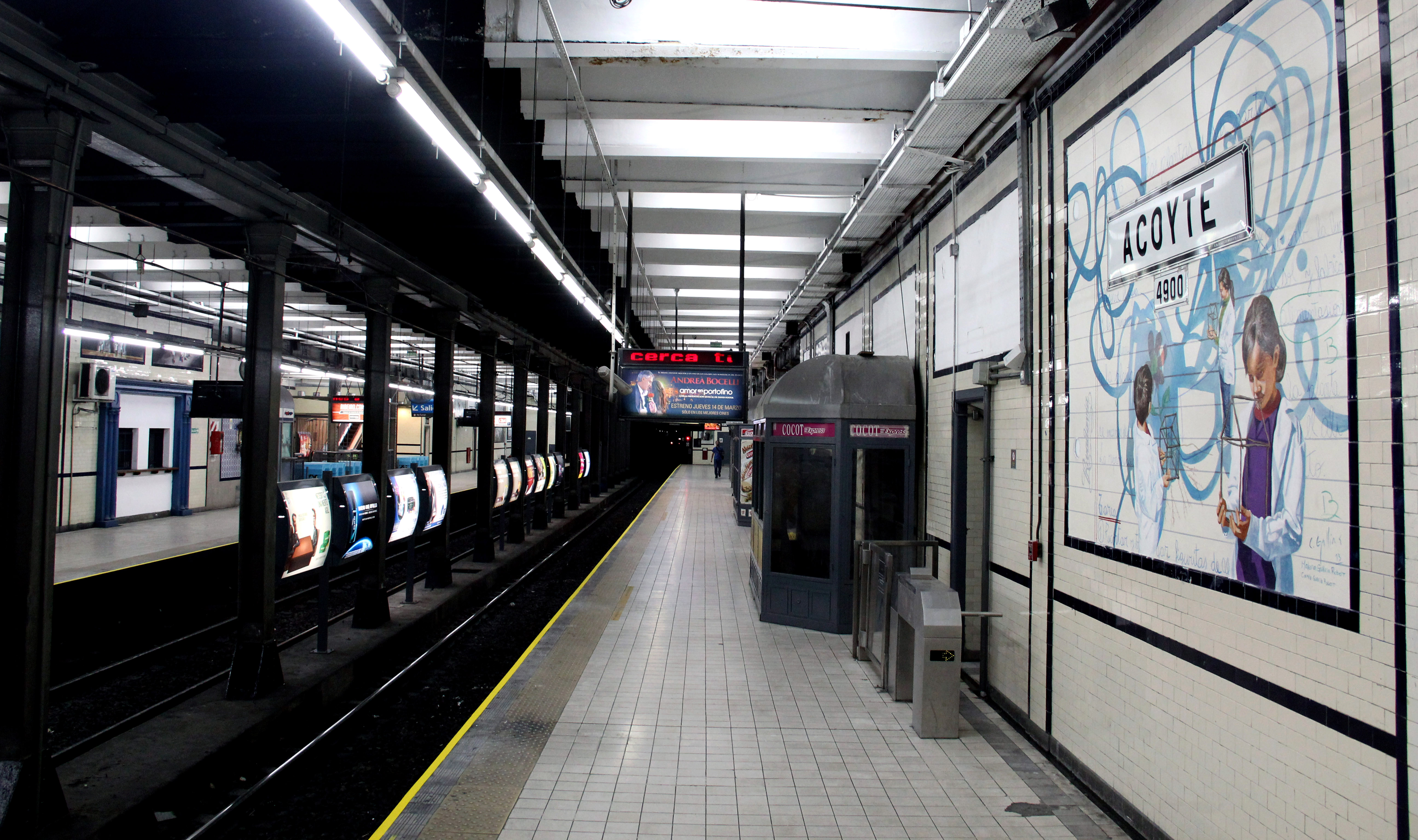 Vista del andén